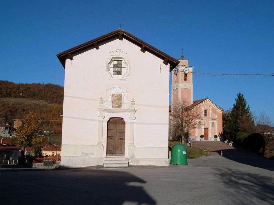 Plodio, Liguria: l'Oratorio della Confraternita degli Angeli Custodi e, in secondo piano, la chiesa parrocchiale di Sant'Andrea Apostolo.